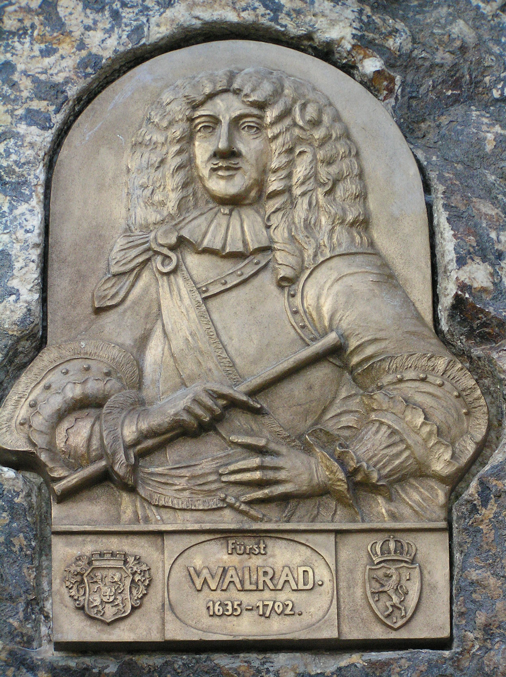 Fürst Walrad (Denkmal im Usinger Schlosspark). Die Bronzetafel wurde 2004 durch Kurt Heinrich geschaffen